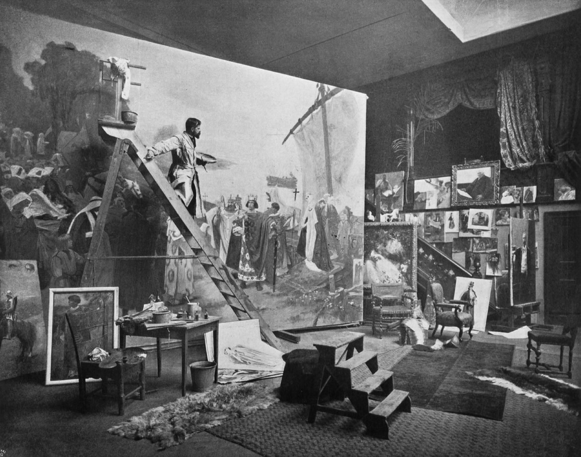 Prof. Hugo Vogel arbeitet in seinem Atelier an einem Zyklus monumentaler Wandgemälde für das neue Ständehaus der Provinz Sachsen in Merseburg.